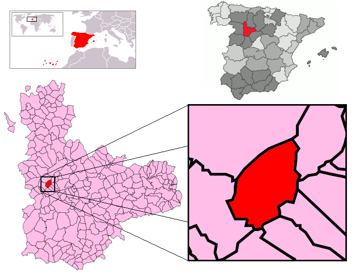 Adalia en la provincia de Valladolid